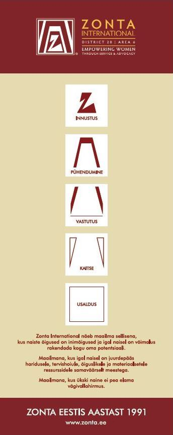 Zonta 20. alapiirkonna tunnused ja põhimõtted